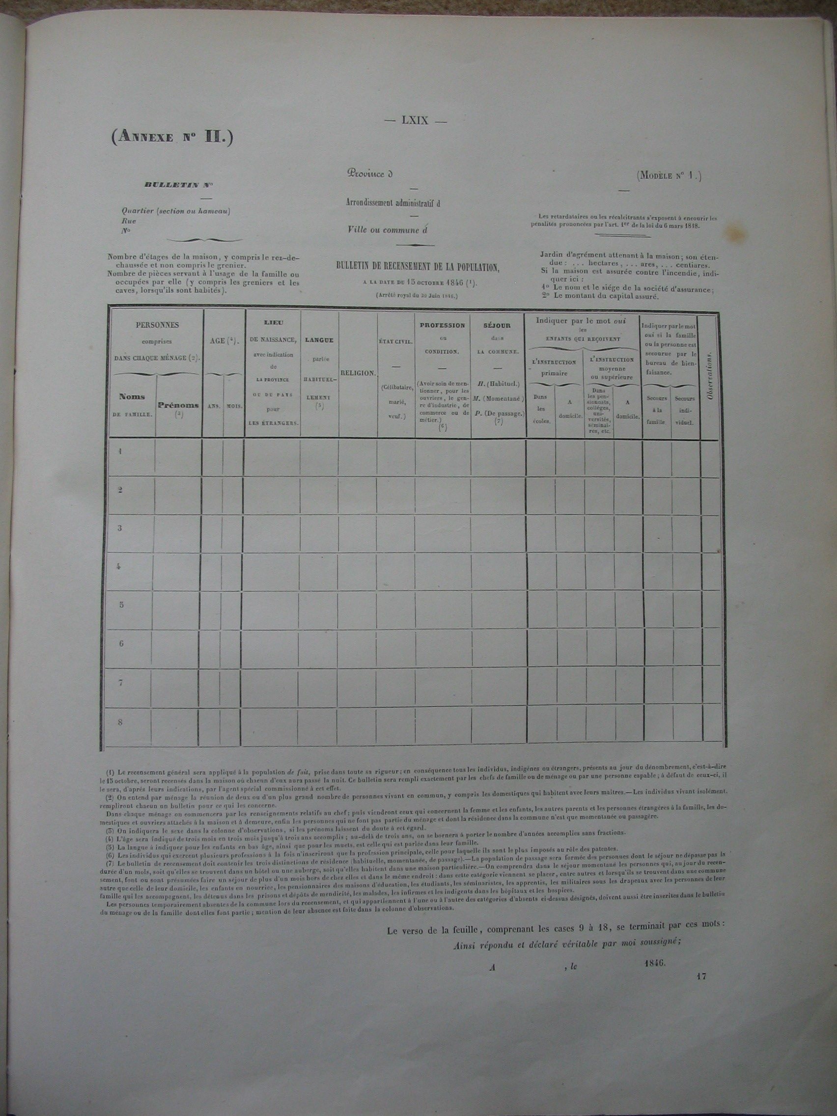 Modelformulier voor de volkstelling-talentelling van 1846 in België. Zelf gemaakte foto